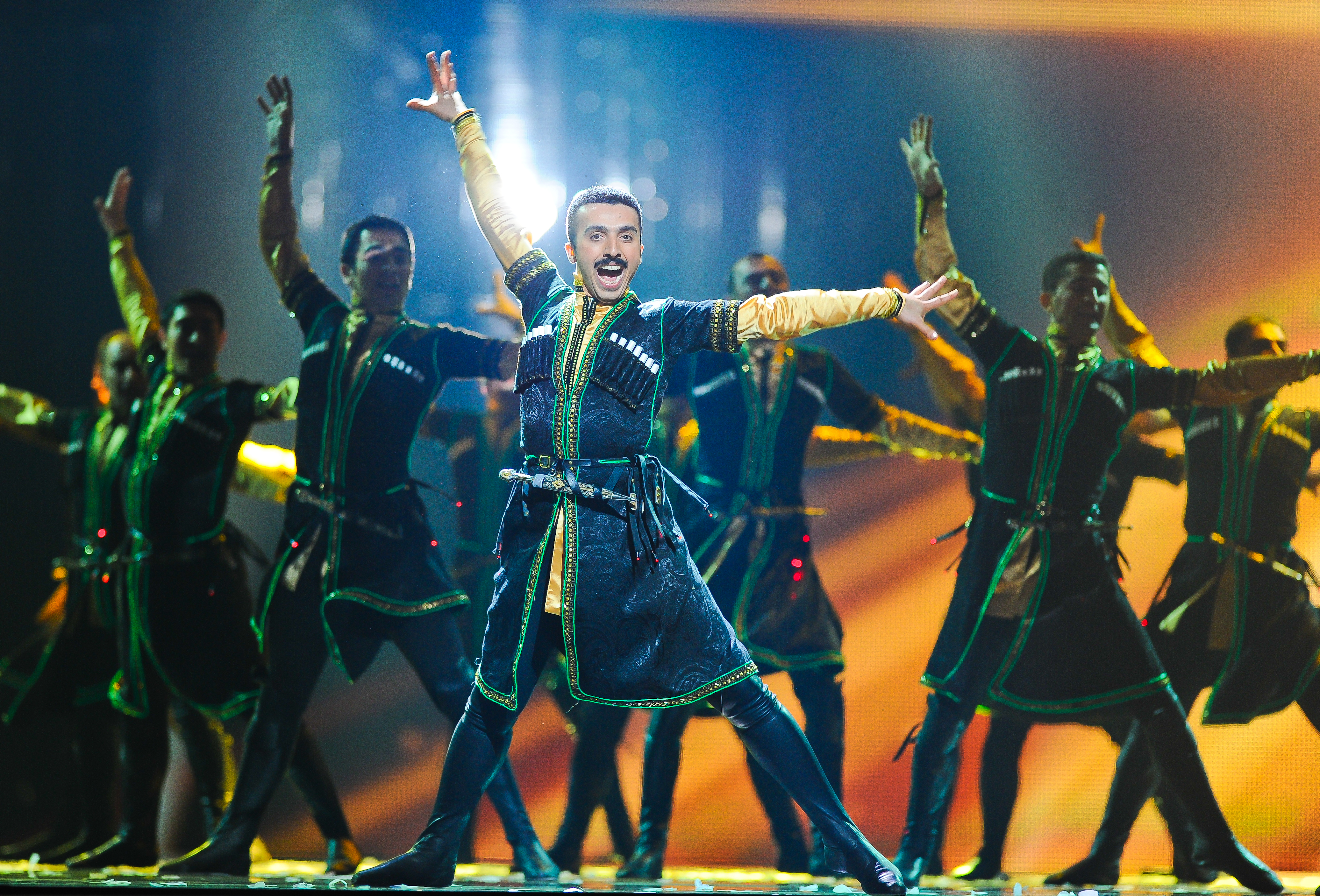 Азербайджанкие танцоры на сцене Baku Crystal Hall